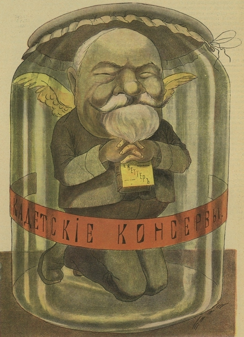 Председатель бюджетной комисии Михаил Павлович Федоров, карикатура Боба.